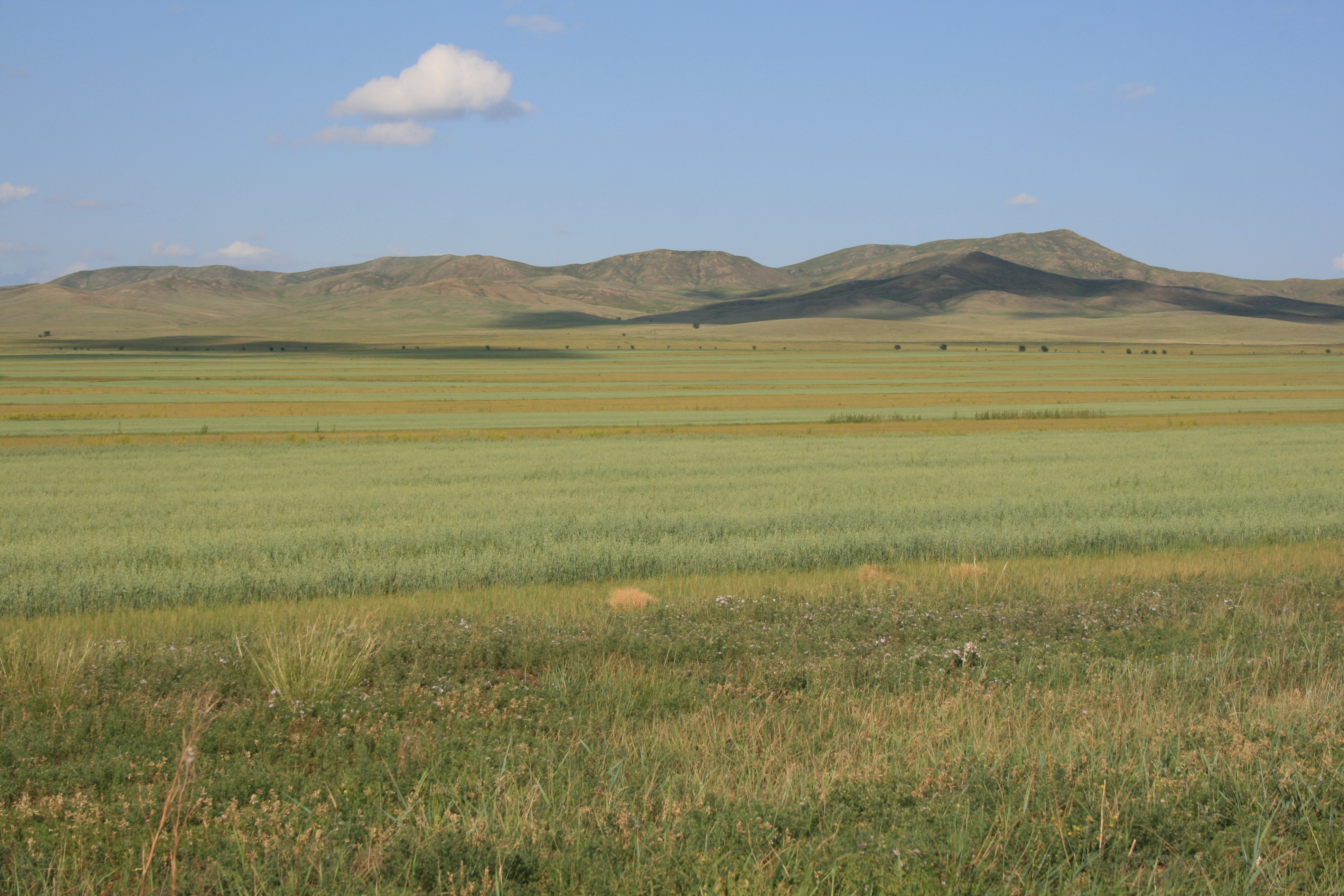 Боргой (Джидинский район)